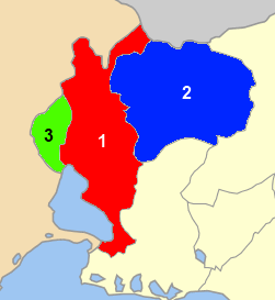 Χάρτης των ενοτήτων του Δήμου Ιάσμου